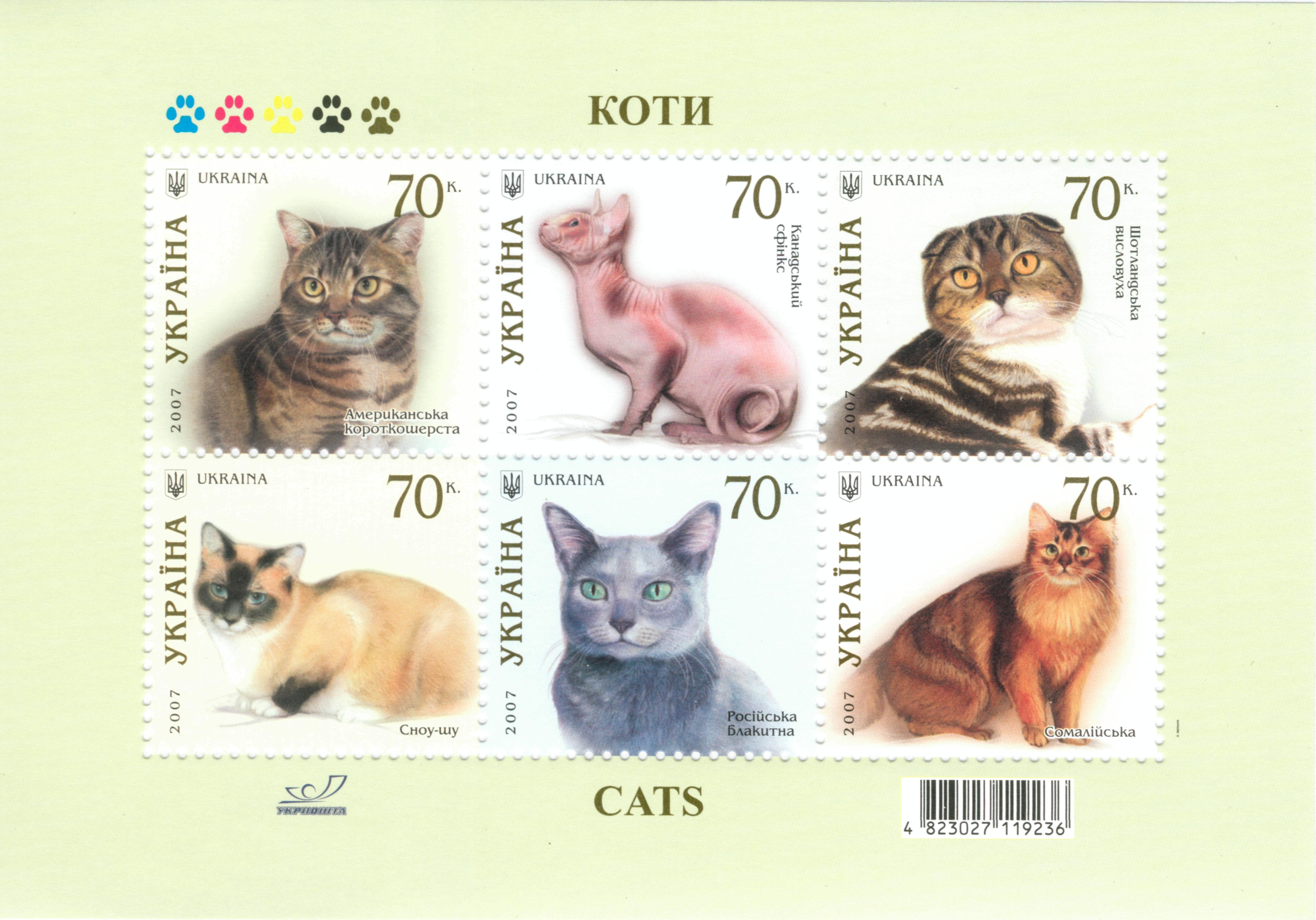 Коты. Марочный лист Украины из шести марок 2007 года.